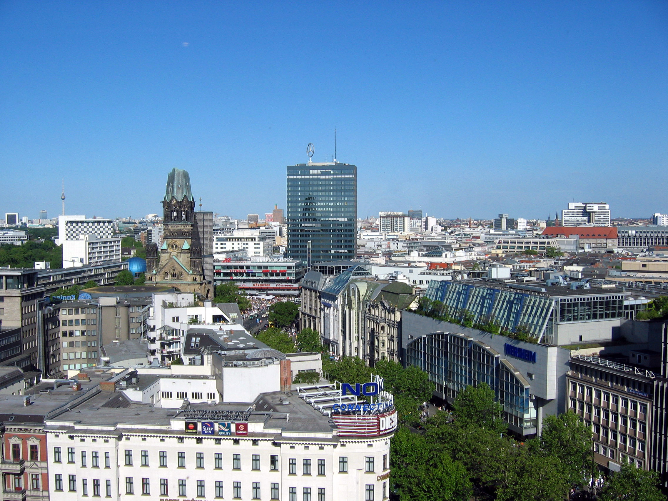 Kurfürstendamm at Joachimstaler Strasse, Berlin (Kaiser Wilhelm Memorial Church, left; Wertheim department store, right)